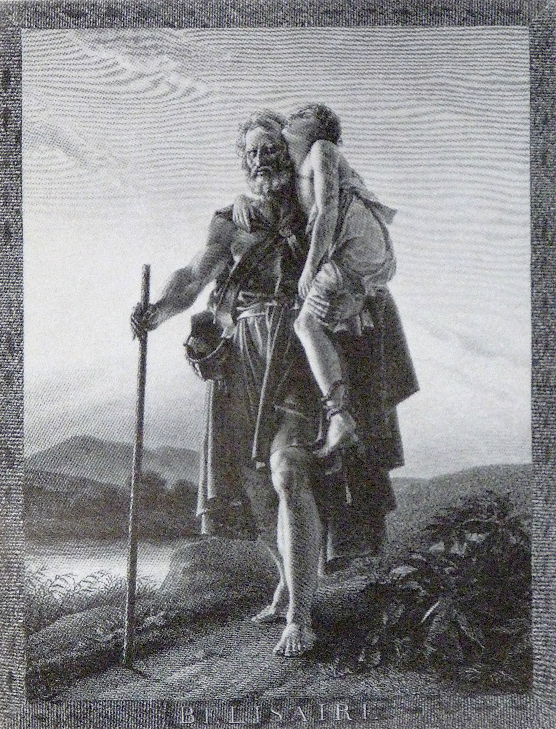 Gravure d' Auguste Desnoyers d'après le tableau de François Gérard Bélisaire présenté au Salon de 1795, disparu et retrouvé depuis. Paris, BnF ; publié dans "Aux armes et aux Arts", Adam Biro, 1988.